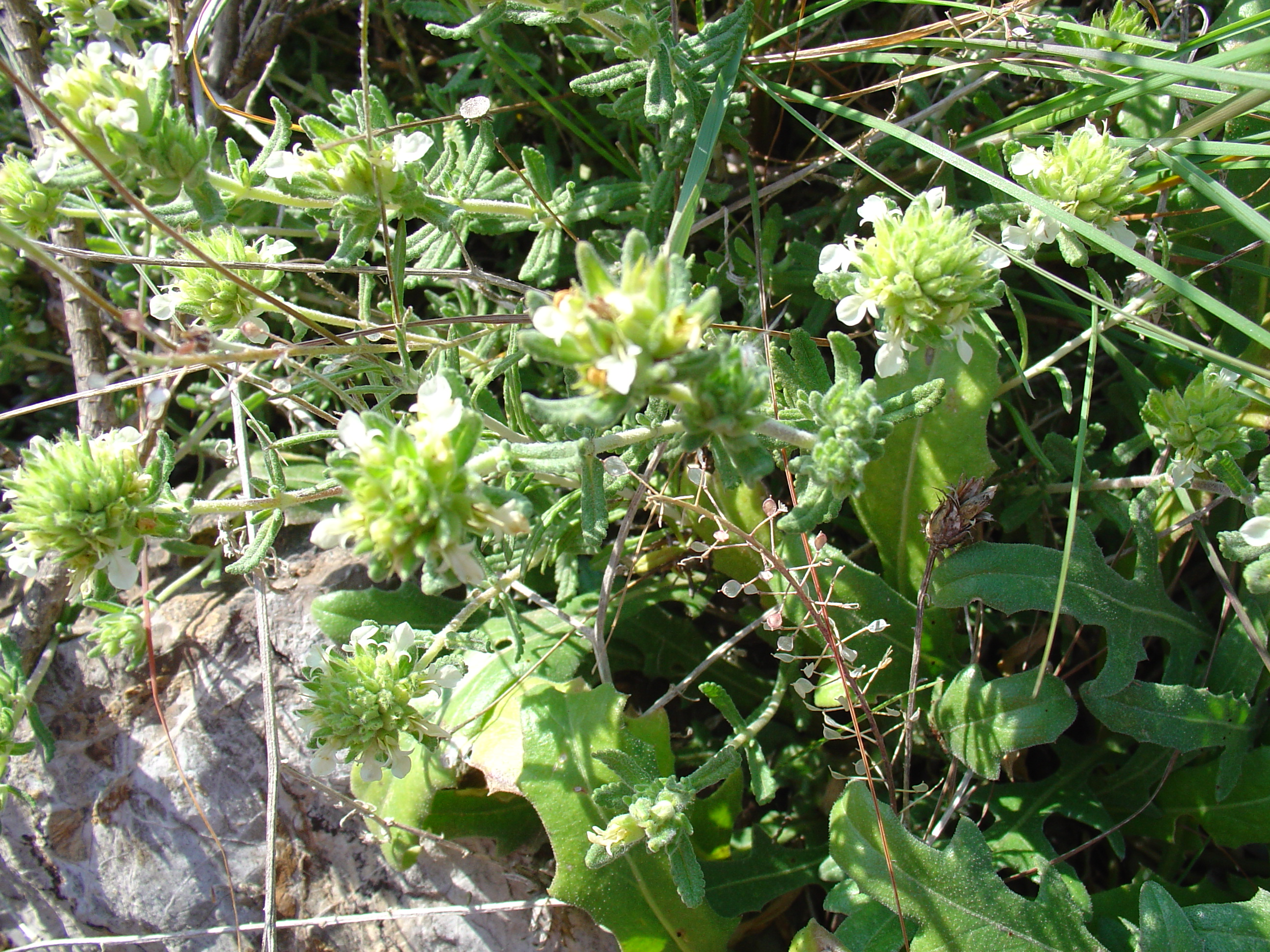 Teucrium carthaginense procedente de margen de camino en Sierra Minera, Murcia, Spain